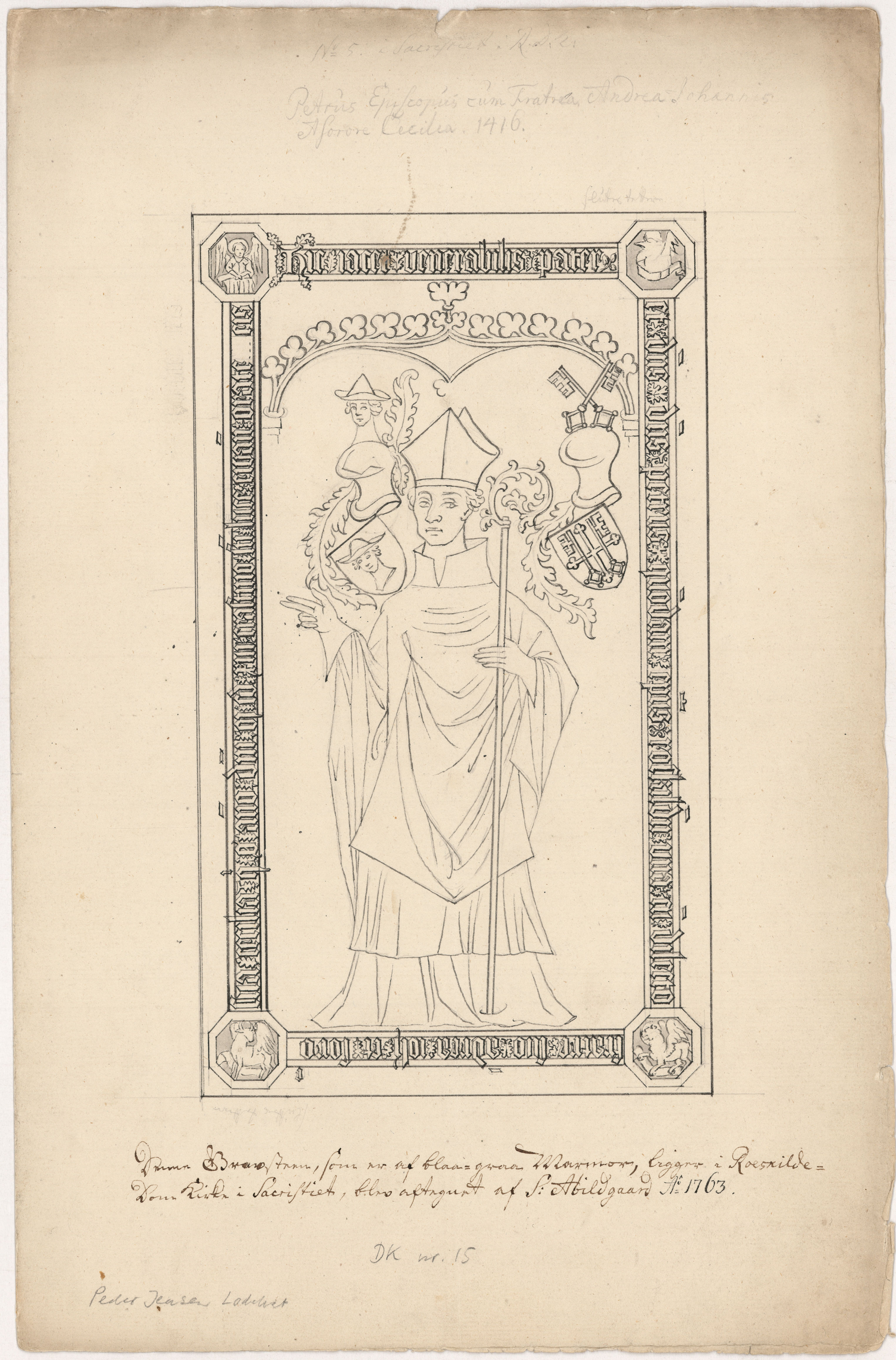 Roskilde Domkirke. Gravsten over Peder Jensen Lodehat Roskilde sogn, Sømme hrd., København amt